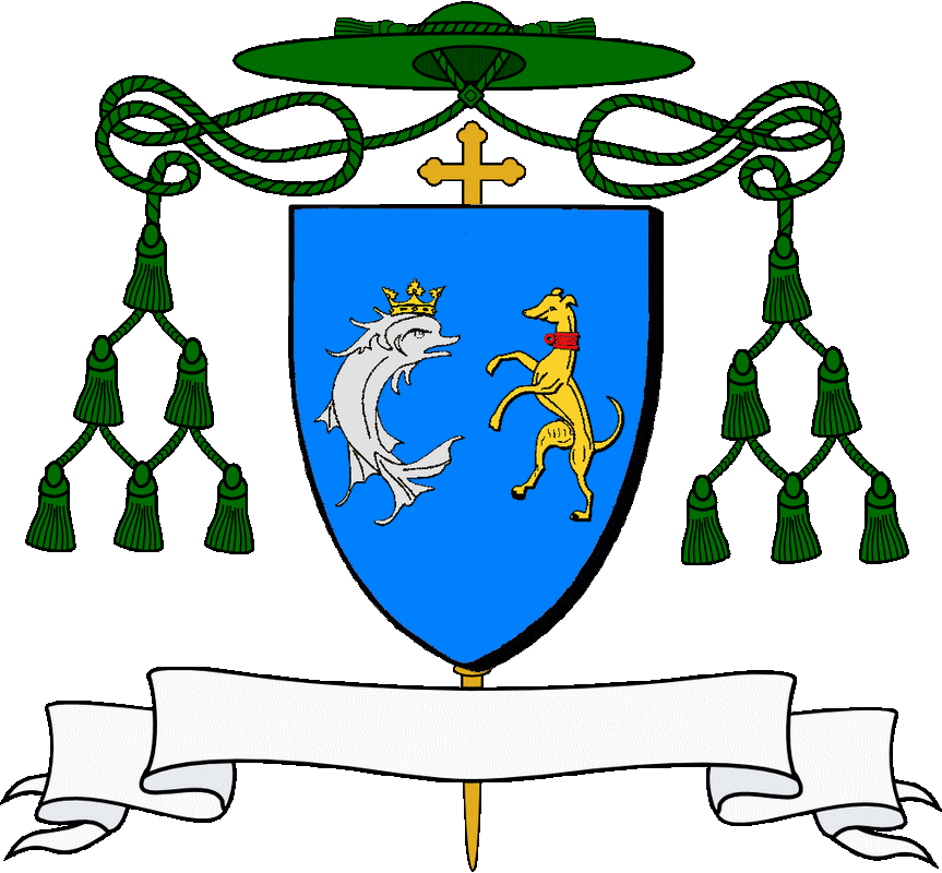 En glazur, e zelfin en arc'hant kurunet en aour ouzh dehoù, ur c'hadgi savant en aour gwakoliek en gwad, o zaou penn-ouzh-penn